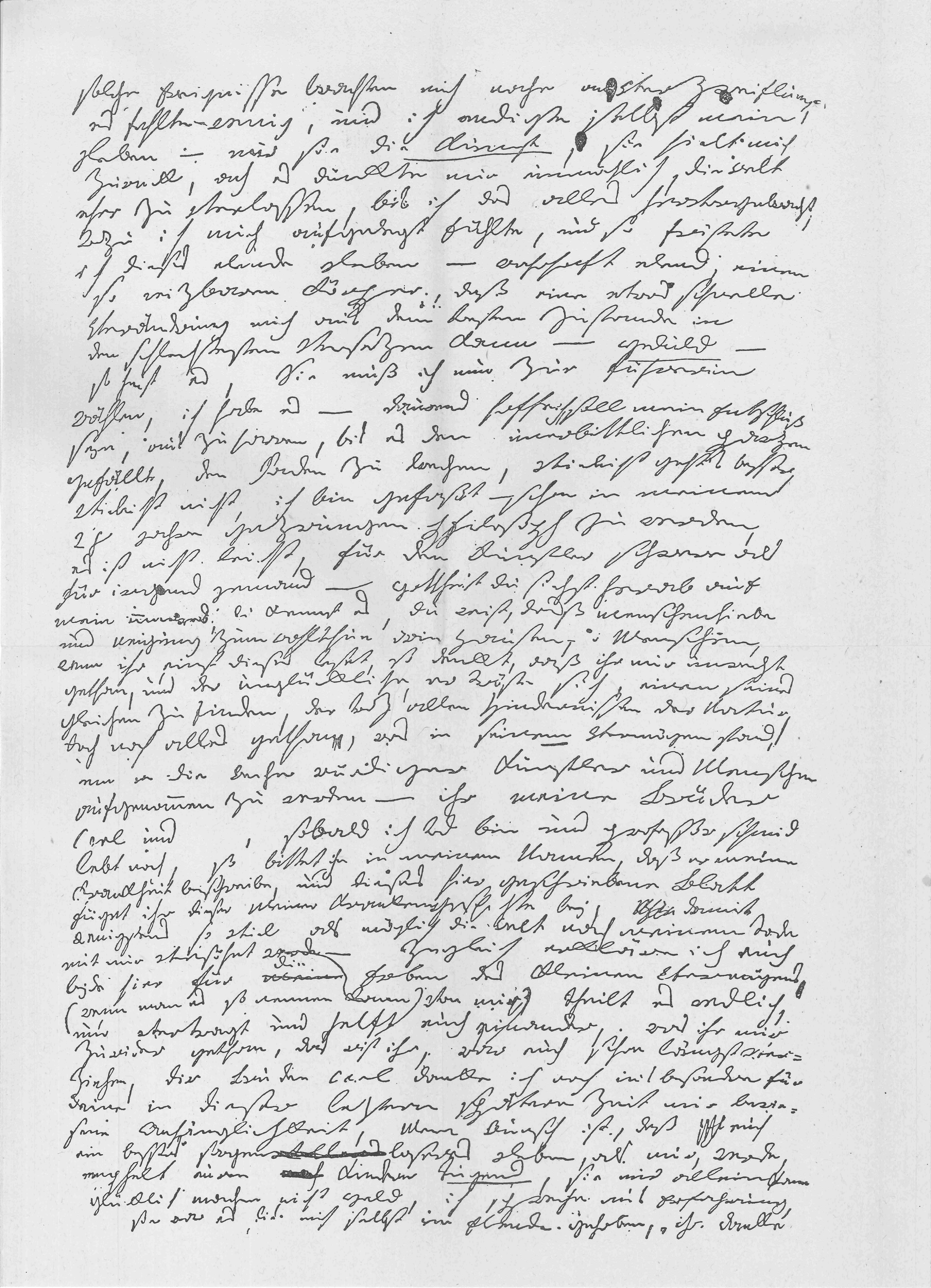 Beethoven Heiligenstädter Testament Faksimile Seite 2